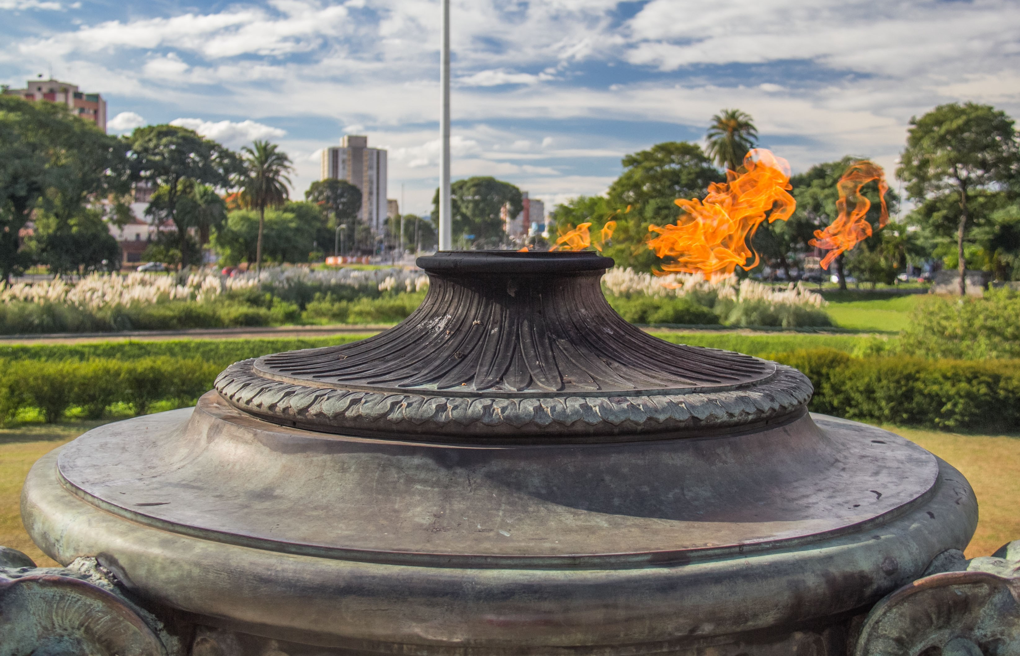 Pira da liberdade,museu do Ipiranga,monumento da independencia,Sao Paulo,Brasil.